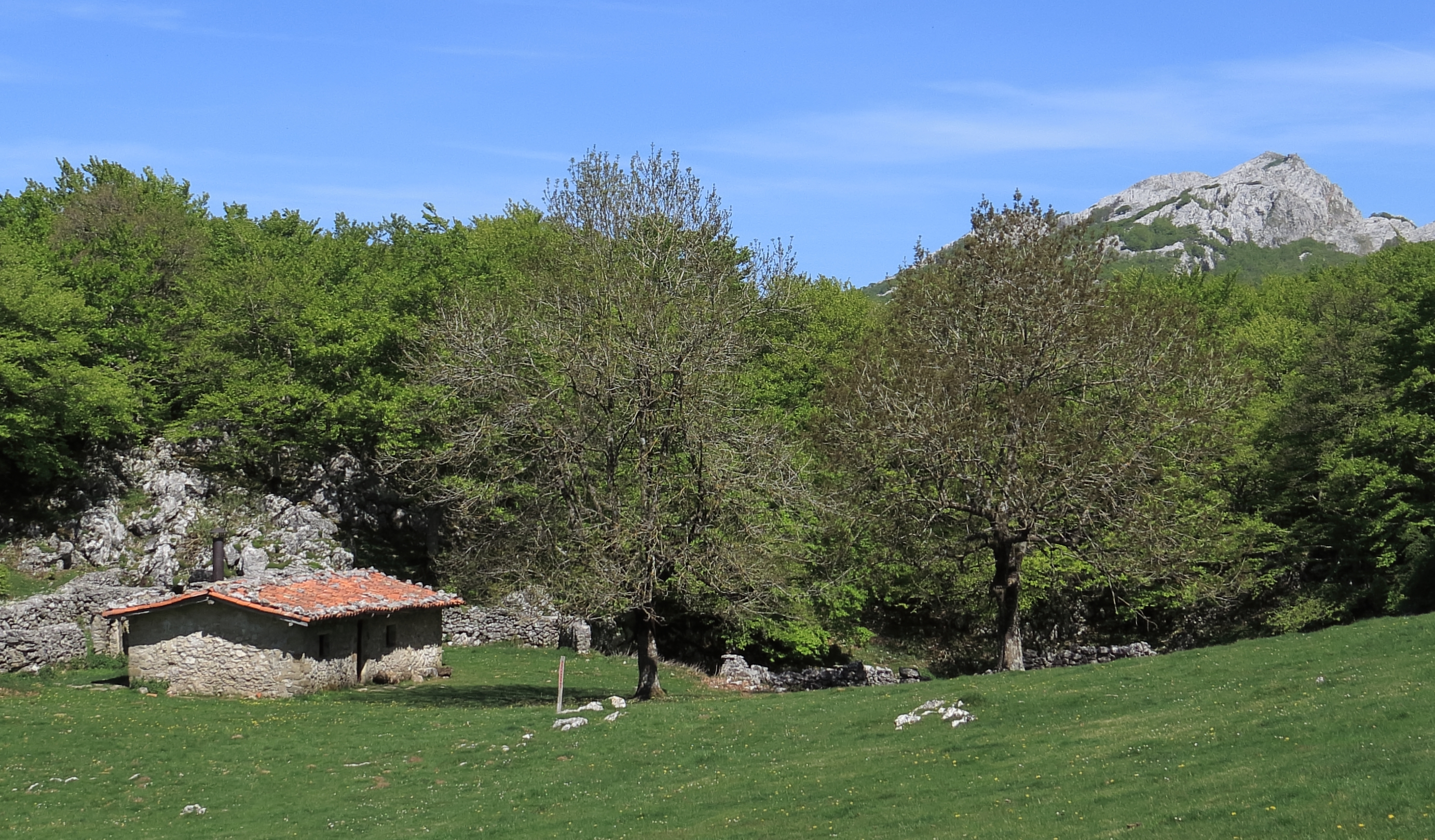 Borda Aratz con el Aitzkorri en el fondo. Borda La Chabola del Tuerto en las laderas del monte Aratz, País Vasco. En el fondo se ve la Sierra de Aitzkorri.